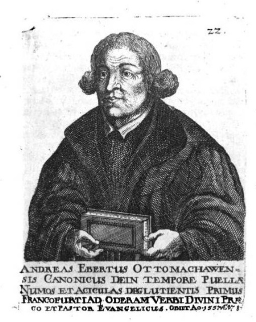 Bildnis Andreas Ebertus (1479–1557)